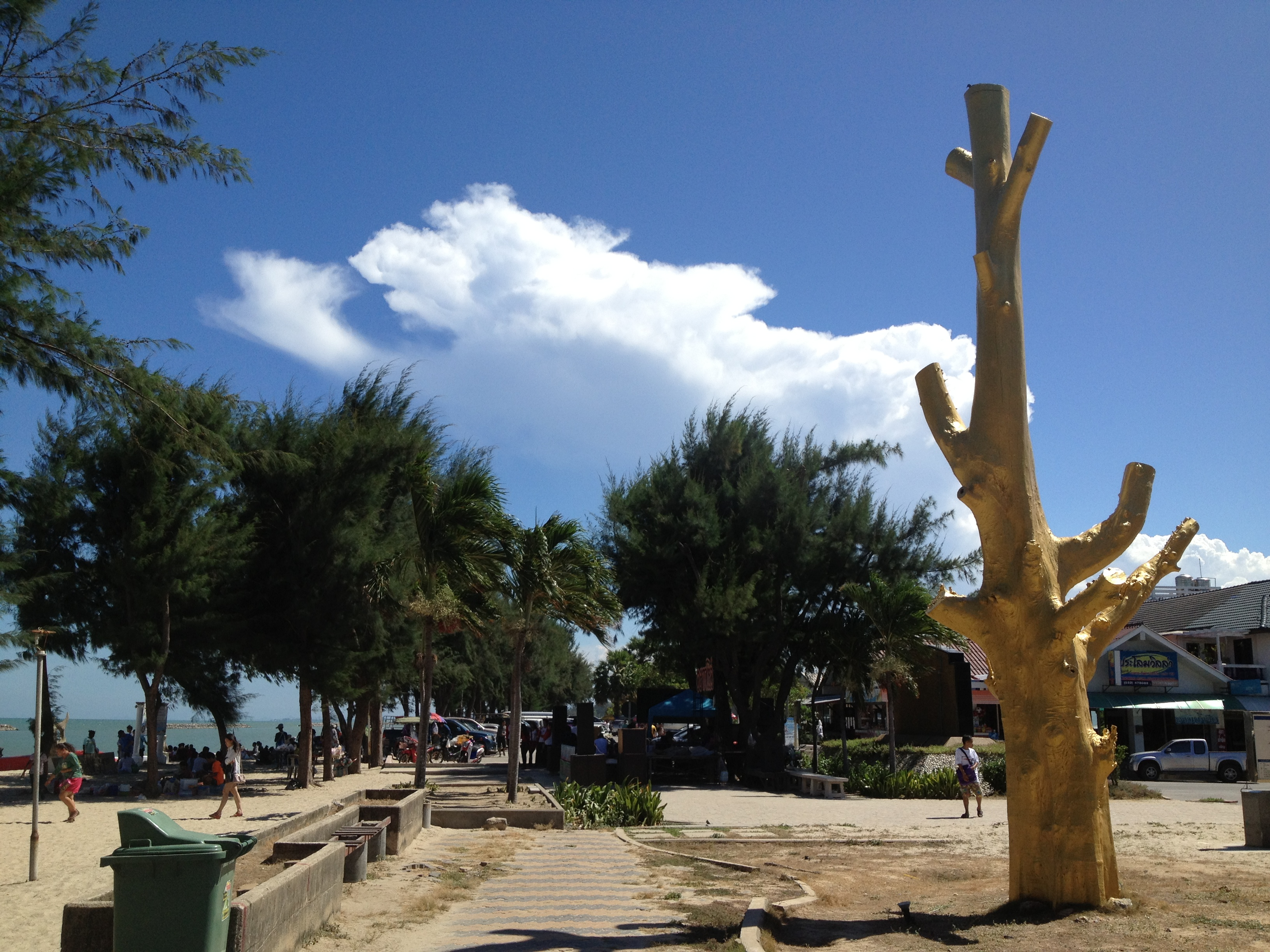 ด้านหน้าหาดเจ้าสำราญ